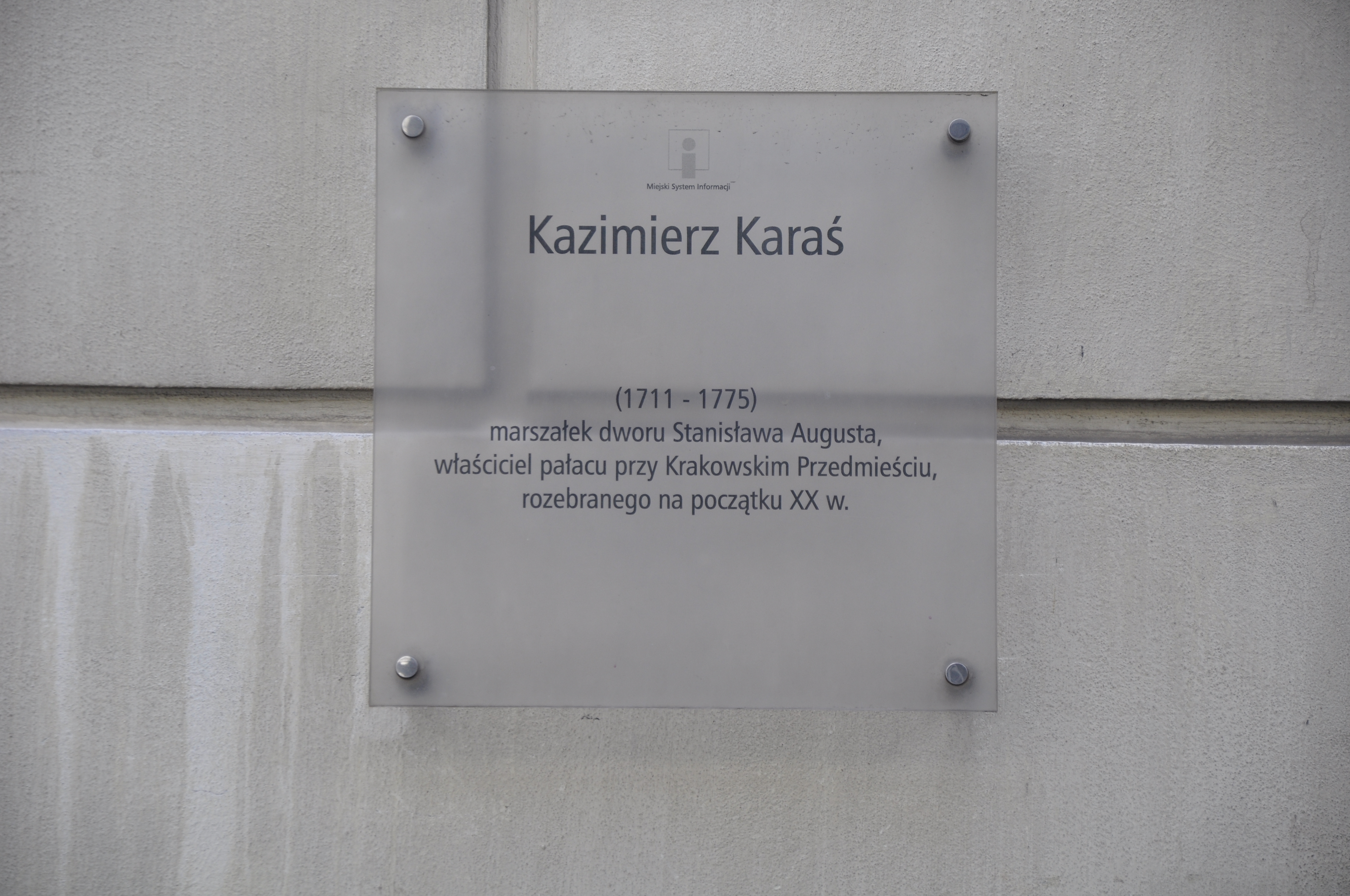 Warschau